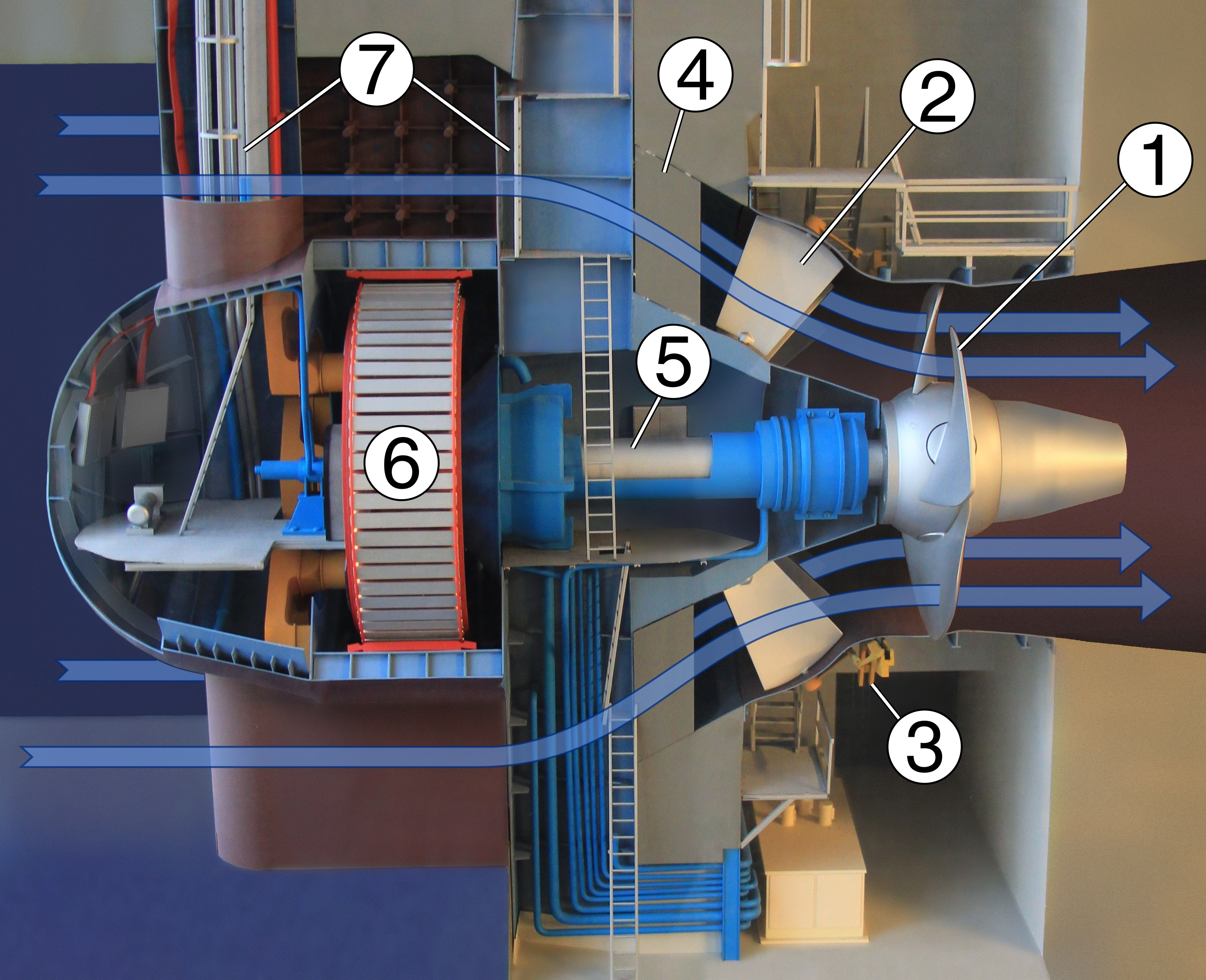 Modell der Maschine 7 (Kaplanrohrturbine) des Donaukraftwerkes Ybbs-Persenbeug Laufradflügel Leitschaufel Leitradregulierung Stützschaufel Turbinenwelle Generator Einstiegsschacht